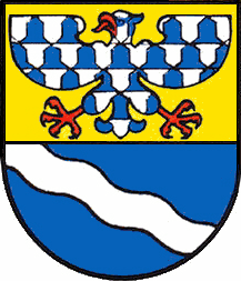 Wappen der politischen Gemeinde Reigoldswil, Schweiz